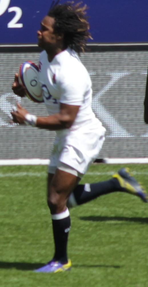 England v Barbarian 2013